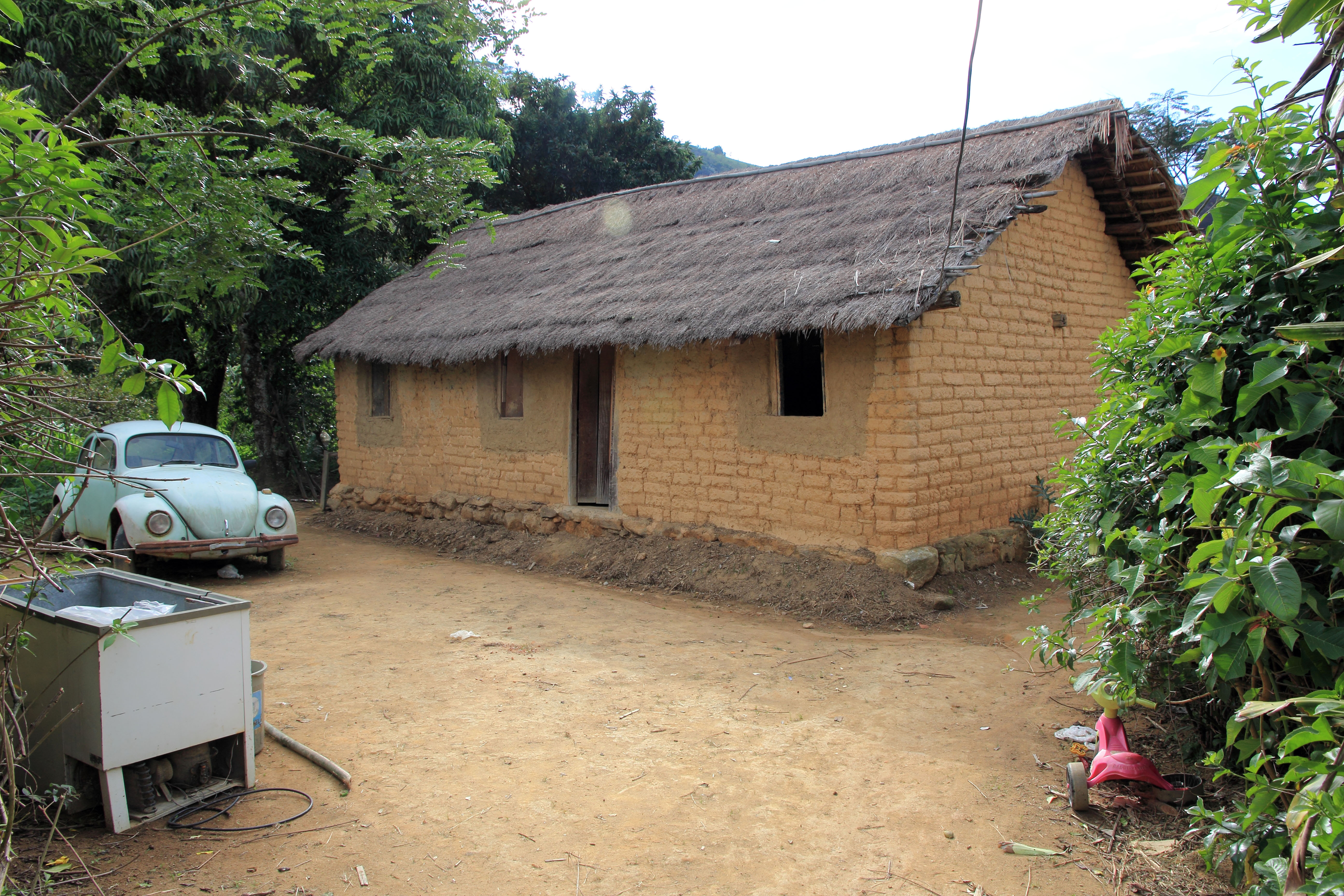 Comunidade descendentes de escravos localizada no Estado do Rio de Janeiro, na cidade de Valença.